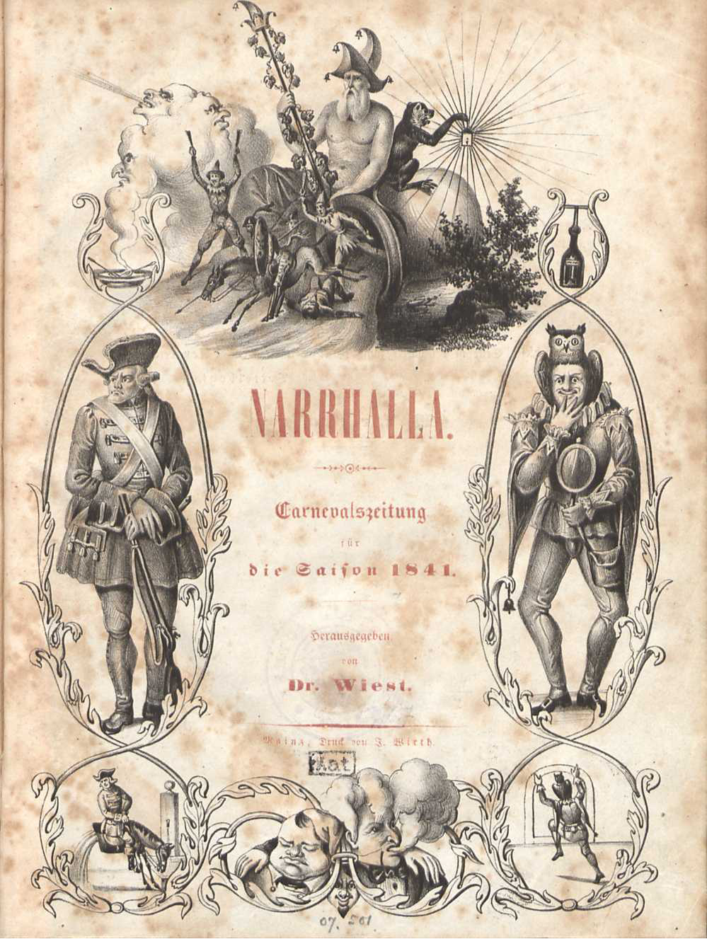 Titelblatt der "Narrhalla - Carnevalzeitung der Saison 1841", Mainz